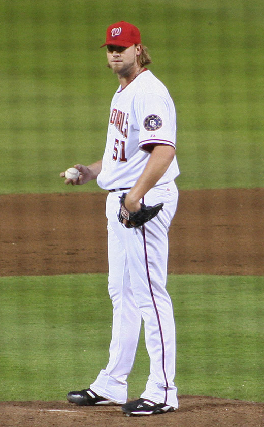 Jon Rauch